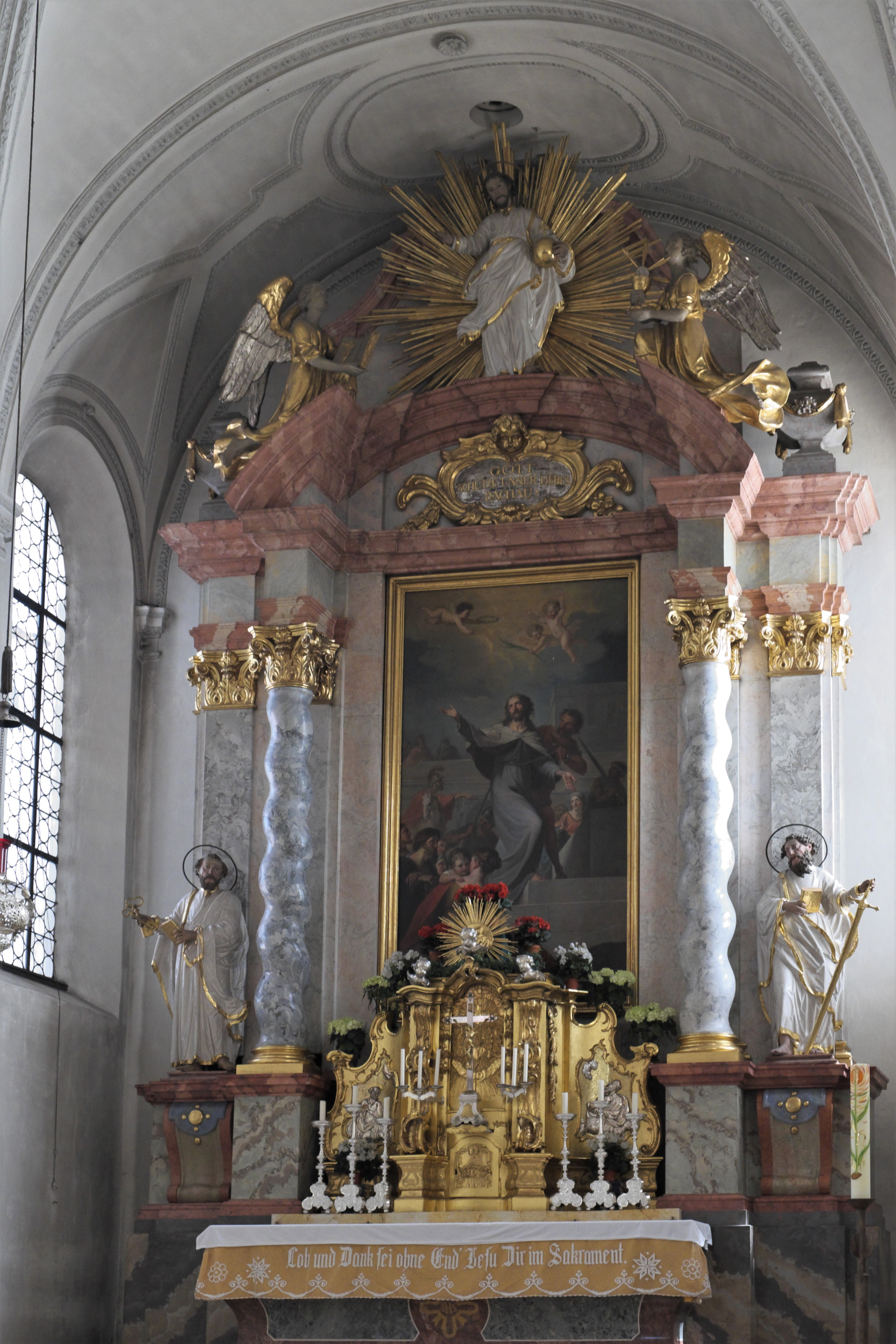 Katholische Pfarrkirche St. Jakob in Dachau (Bayern, Deutschland), Hauptaltar von 1939